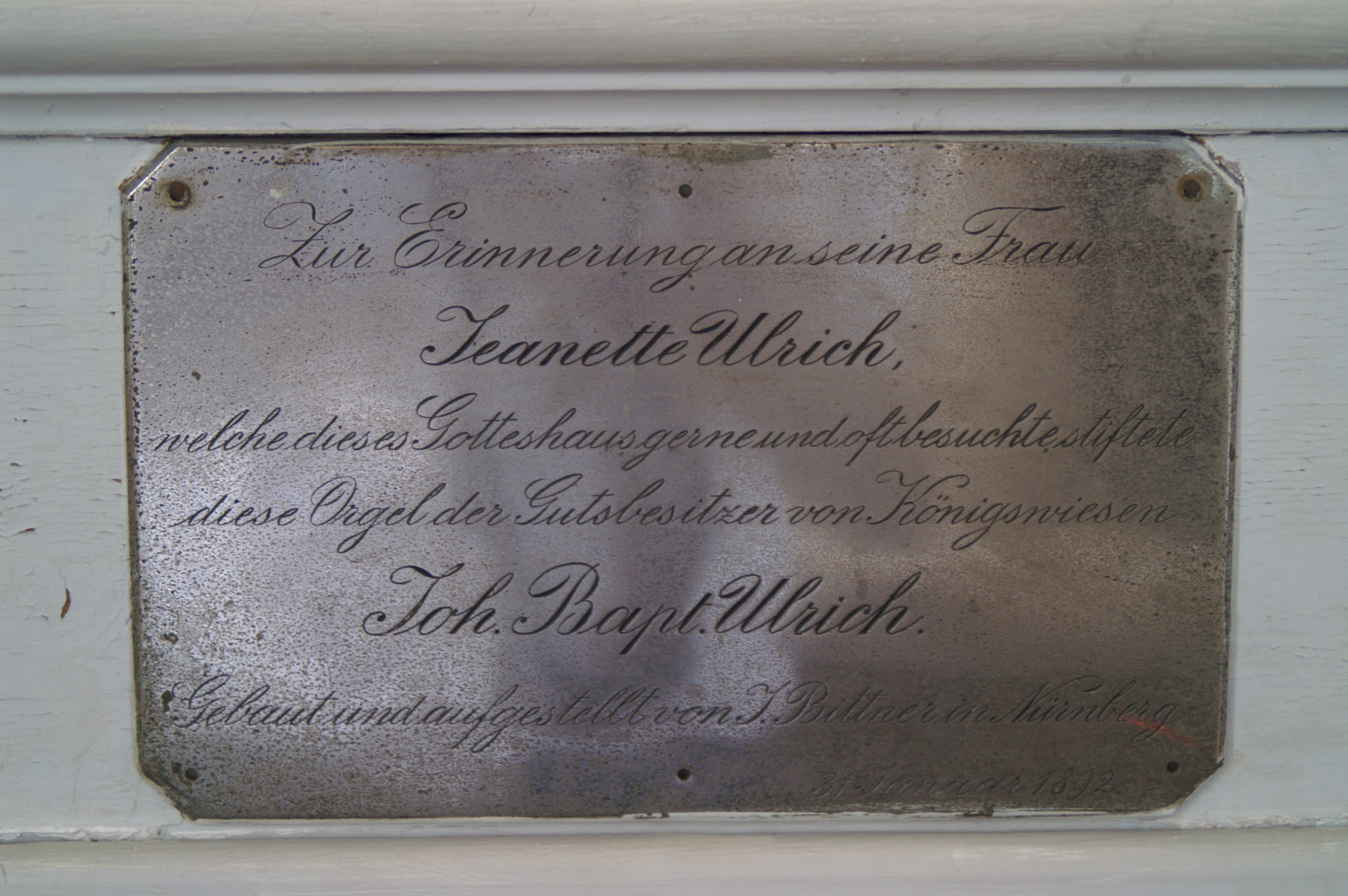 Gedenktafel Orgel Regensburg - Dechbetten